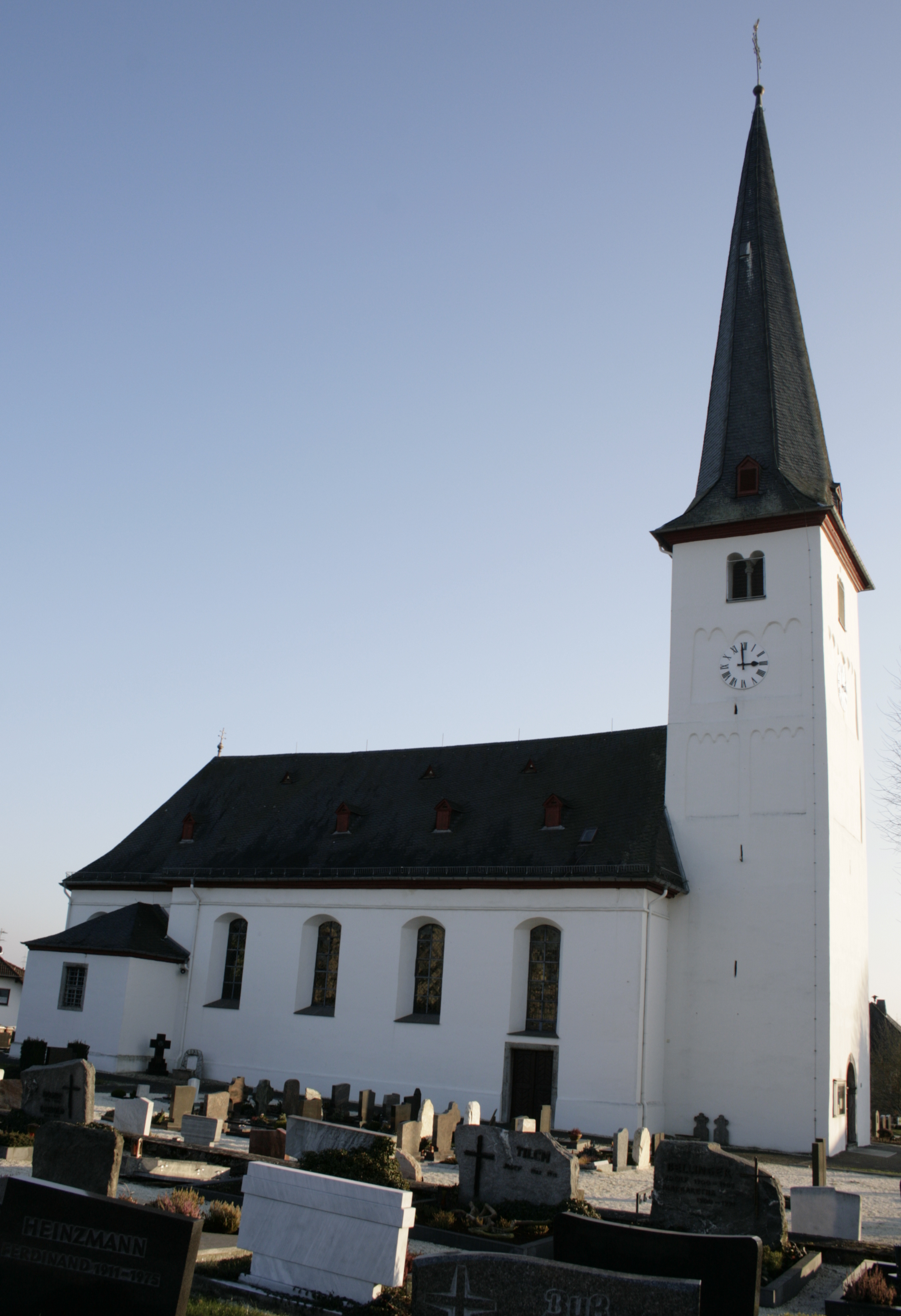 Kirche in Hadamar-Niederzeuzheim, Deutschland, ehemals Zehntscheune